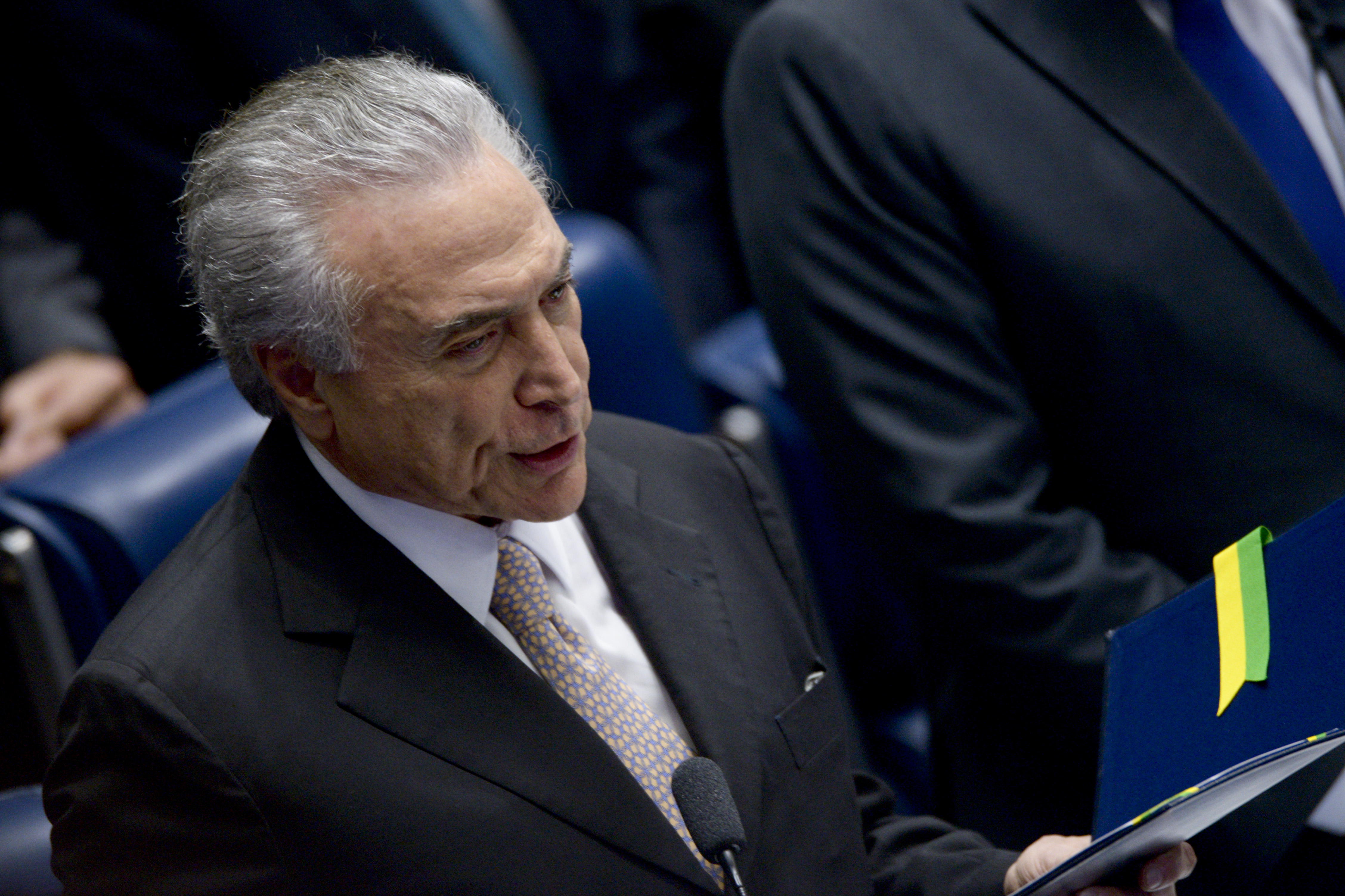 Plenário do Senado durante sessão solene do Congresso Nacional destinada à posse do Excelentíssimo Senhor Michel Temer como Presidente da República. Temer presta juramento constitucional. Foto: Pedro França/Agência Senado